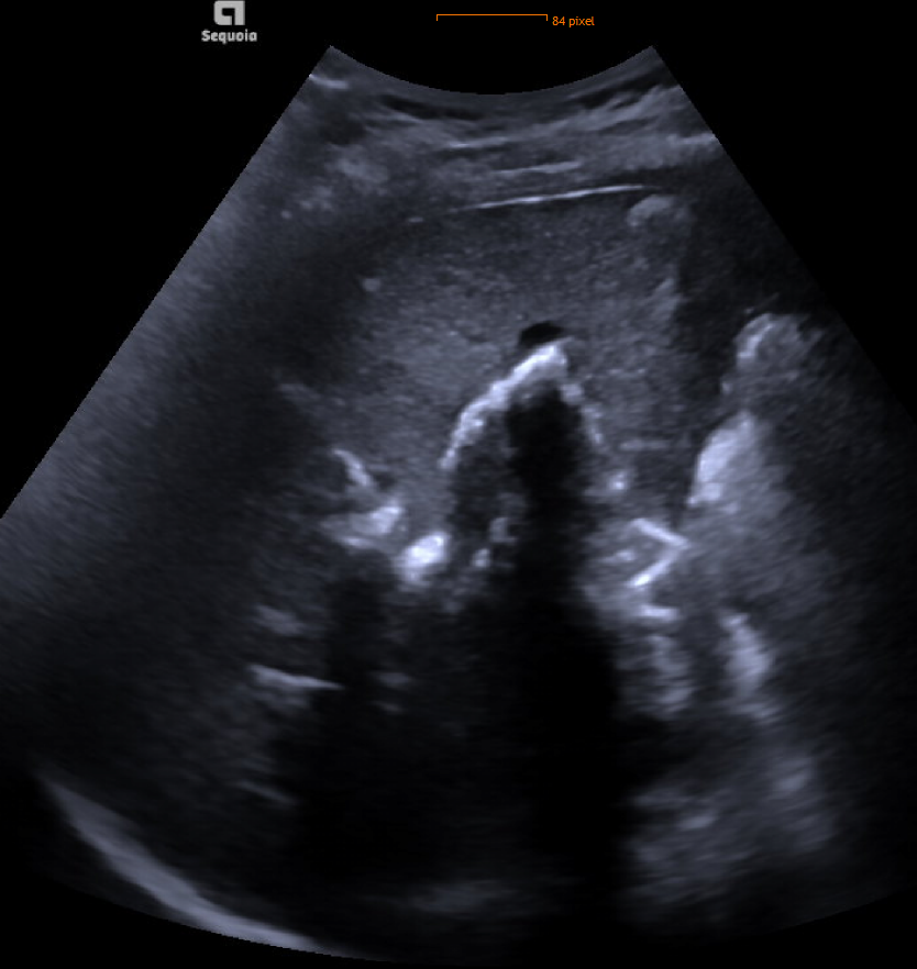 Abdomensonographie bei einer LPAC-Patientin, zu erkennen ist die Leber mit den weitläufig durch Konkremente ausgefüllten Gallengängen mit entsprechenden Schallartefakten hinter den Kalzifikationen.